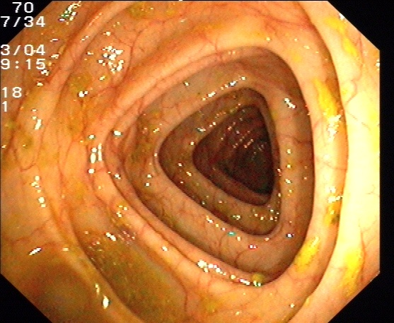 Normalbefund Kolon